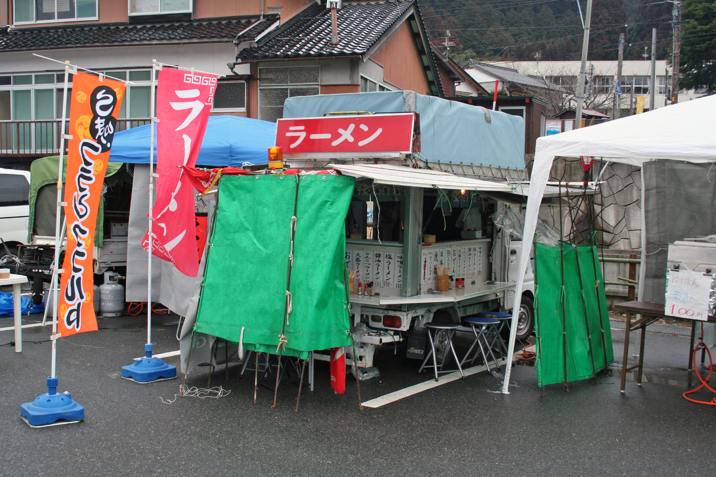 鳥取県八頭郡智頭町にある旧宿場街「智頭宿」。 トラックの荷台を利用したラーメンの屋台。